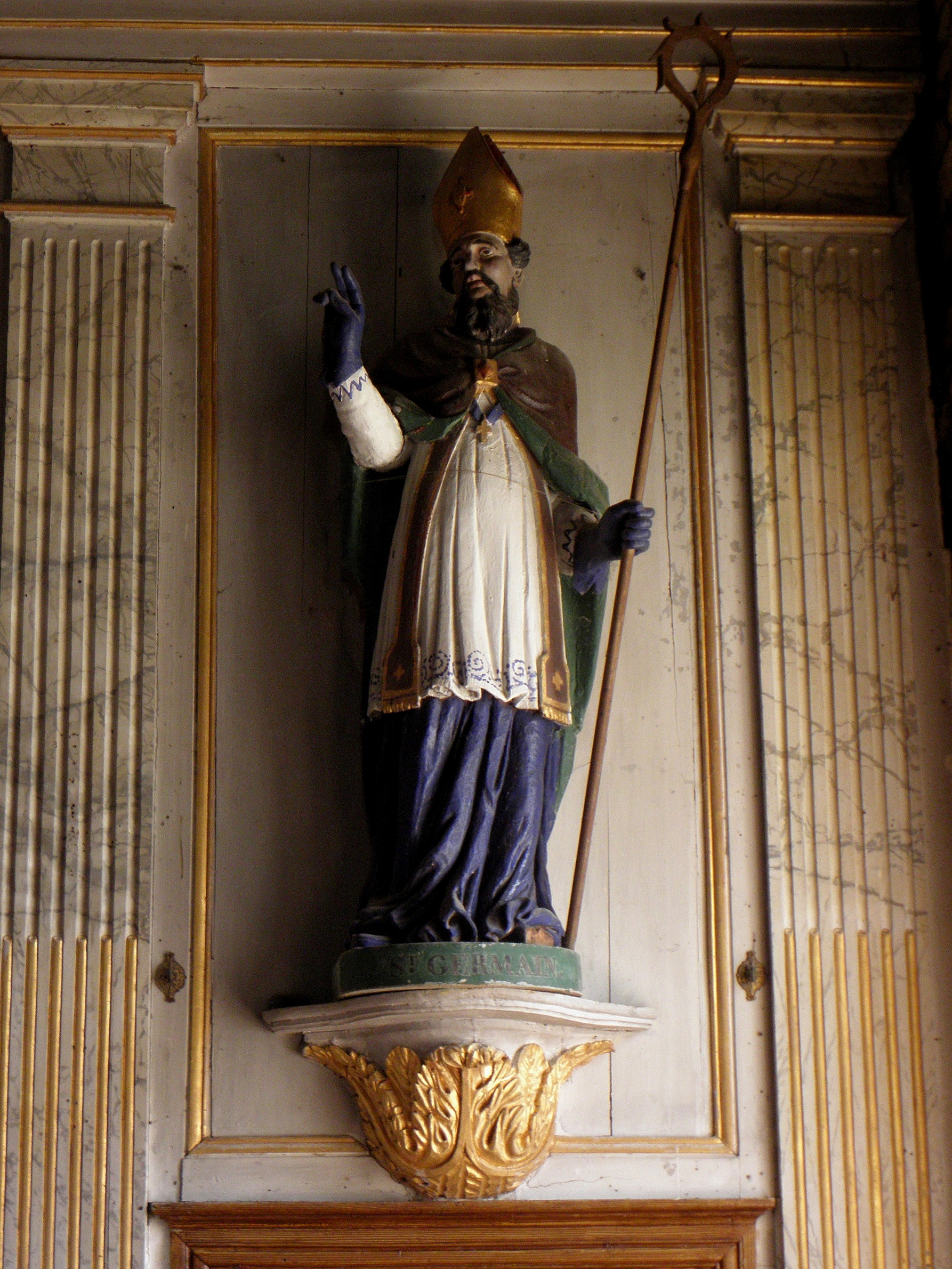 Église Saint-Germain de Trébédan (22). Retable du maître-autel. Statue de Saint-Germain.